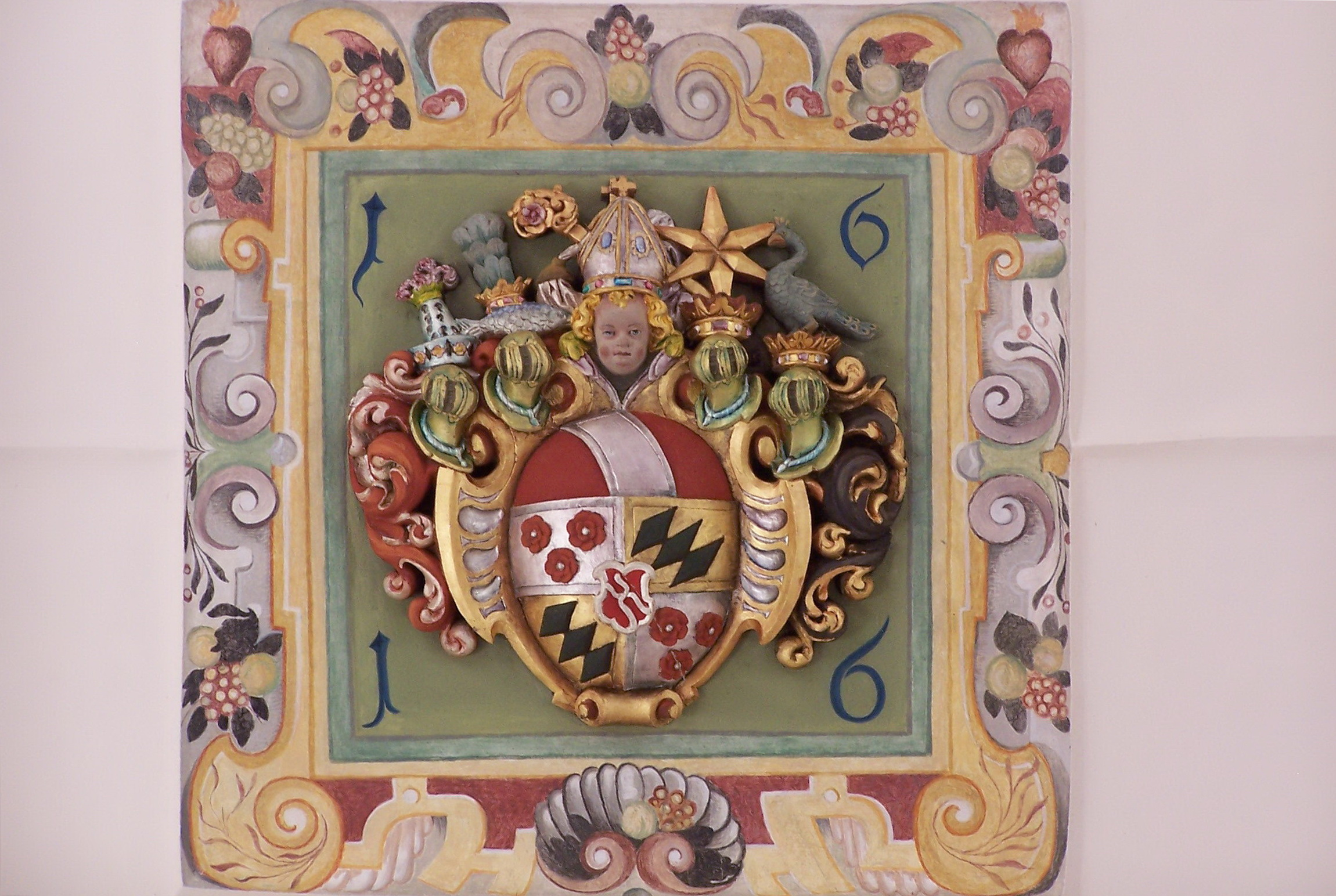 Wörth an der Donau. Schlosskapelle St. Martin. Im Langhausgewölbe an der Trennungslinie der beiden Joche das von Meister Hans Wilhelm gemeißelte Wappen des Bischof Albert mit der Jahreszahl 1616.